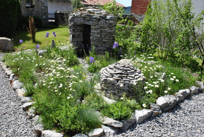 Pepina zgodba.